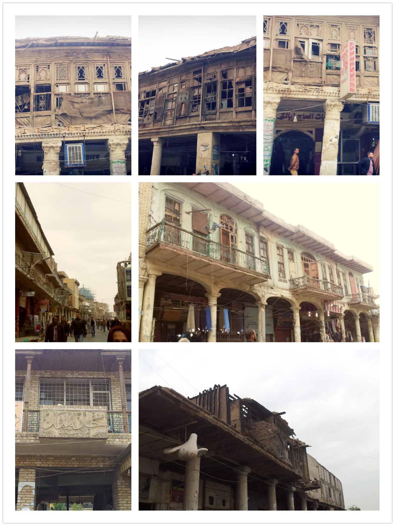 في شارع المتنبي